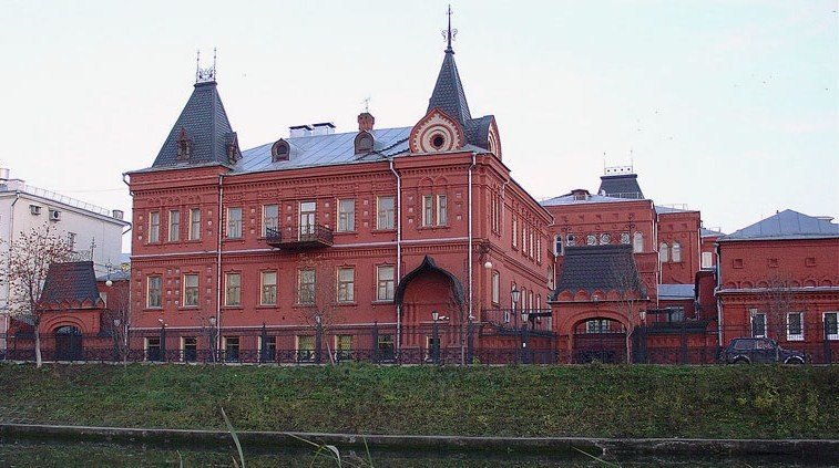 здание центрального банка в Орле